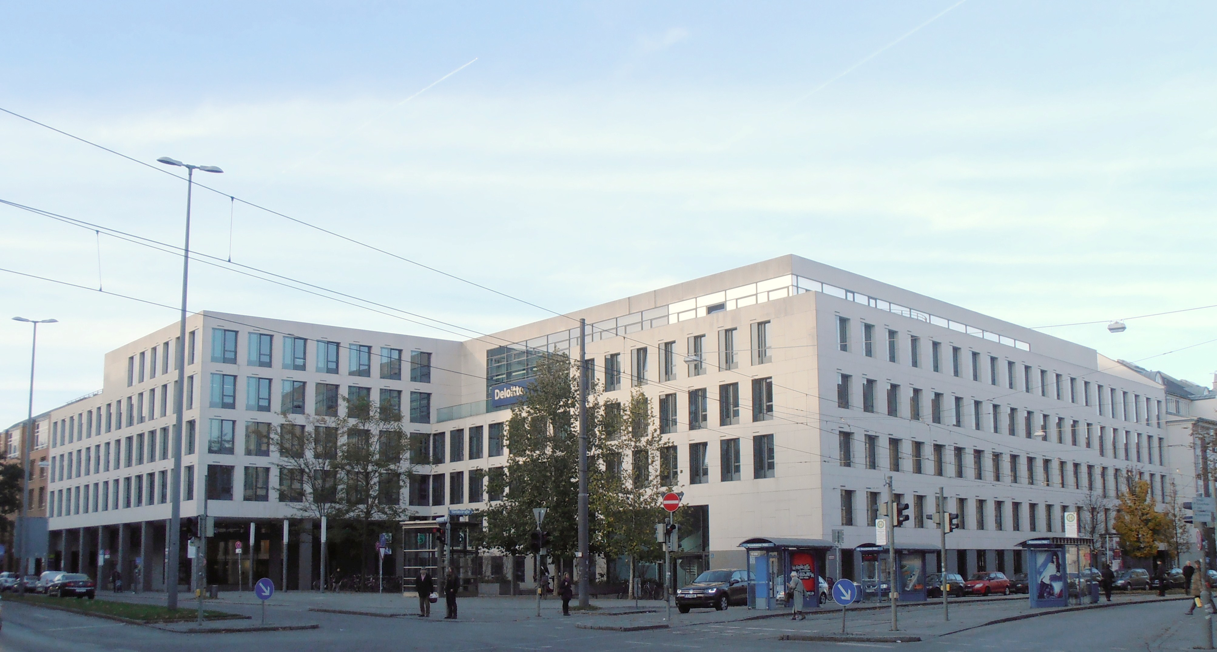 Buerohaus Rosenheimer Platz 4 Muenchen Gesamtansicht